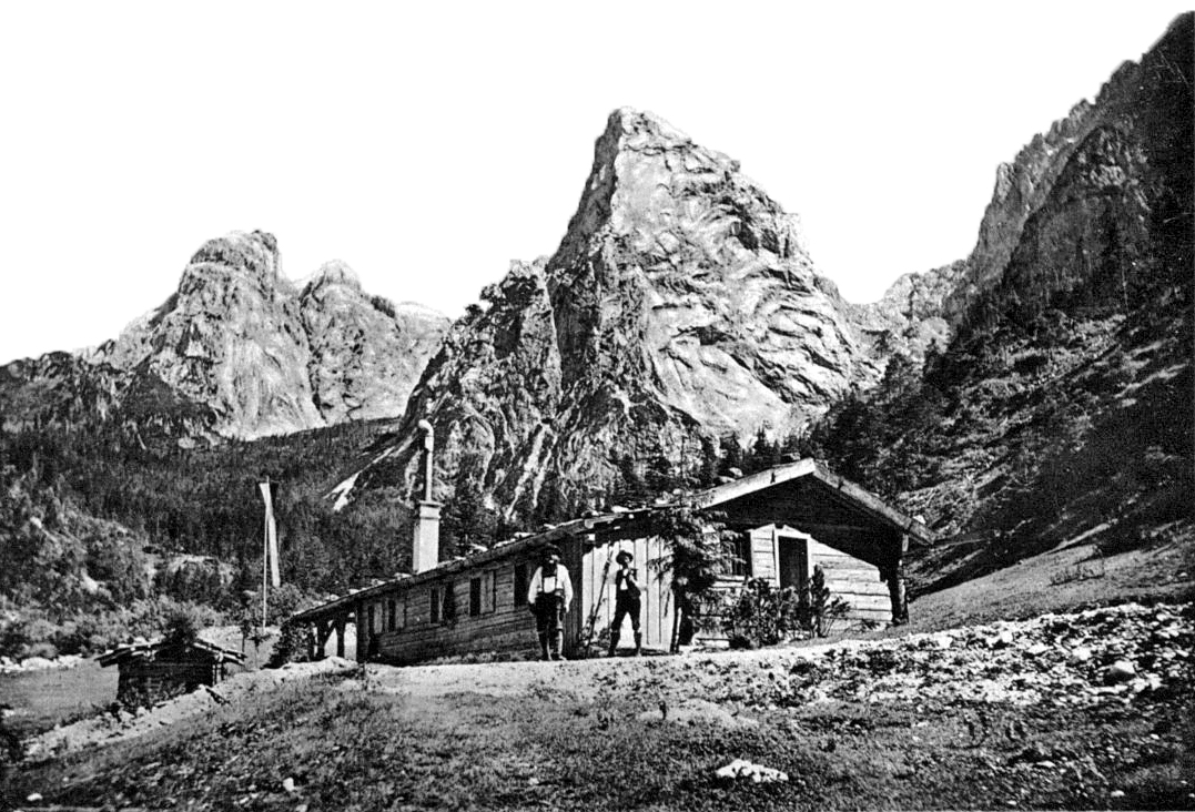 Hinterbärenbadhütte (1894)